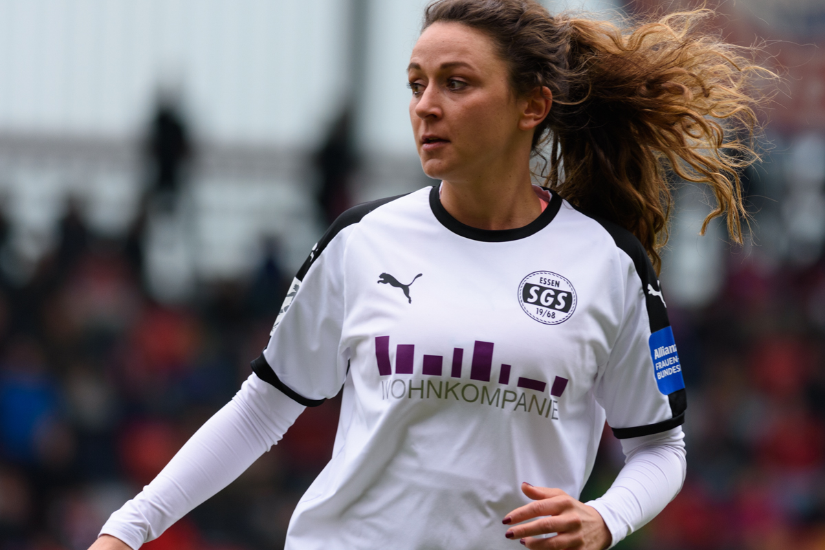 Ramona Petzelberger at FC Bayern vs SGS Essen